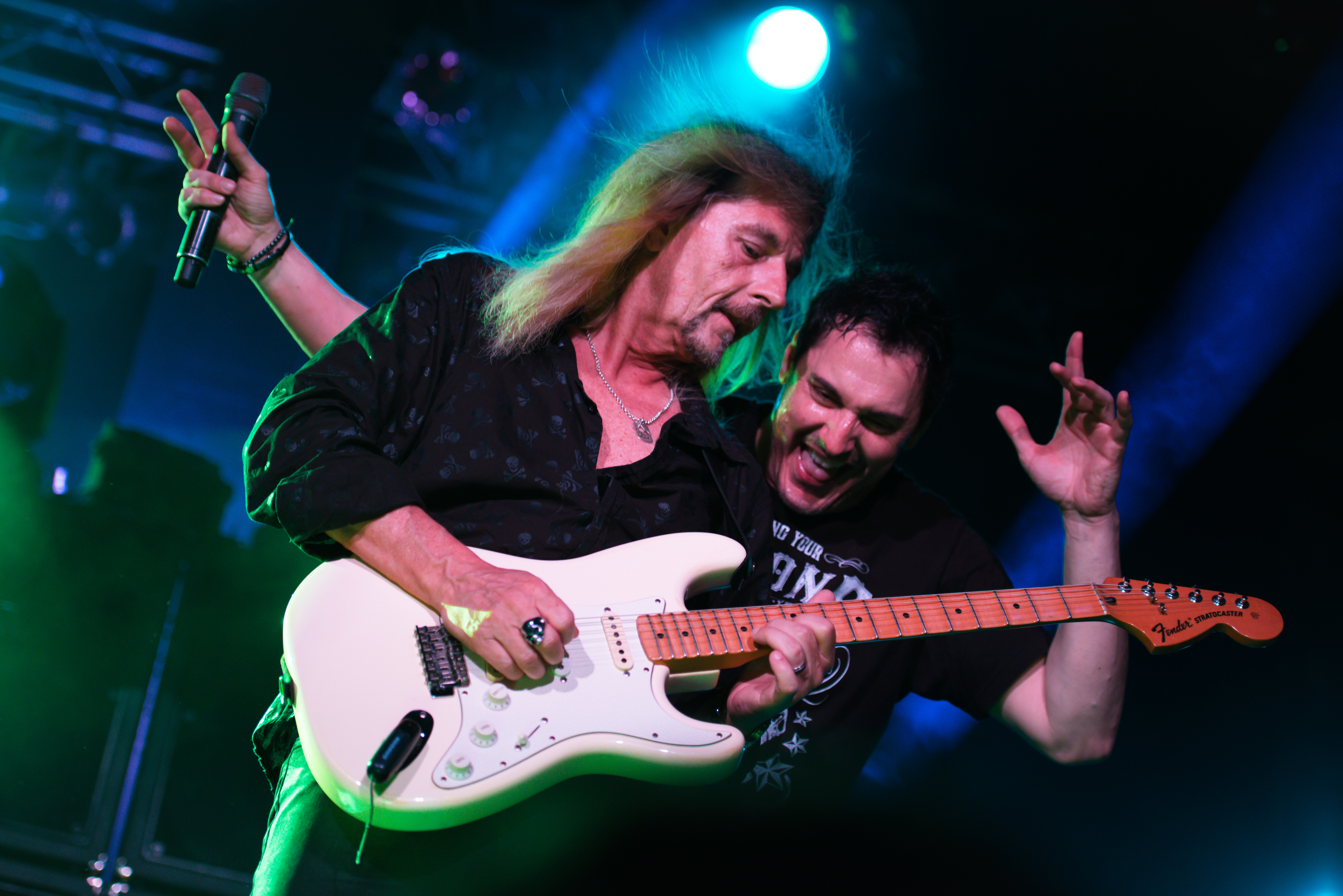 Axel Rudi Pell in der Großen Freiheit 36 in Hamburg 2018